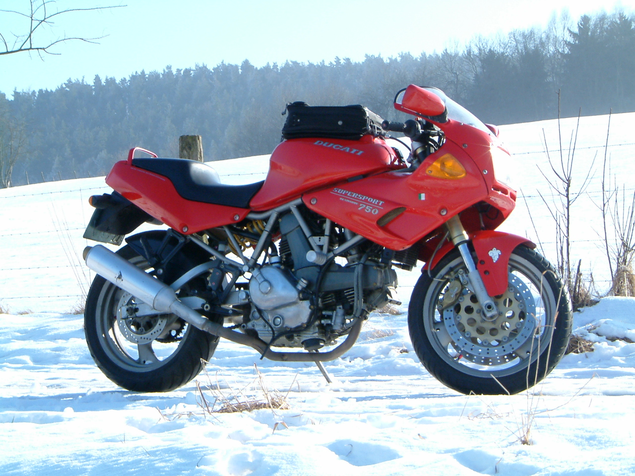 1994er Ducati 750SS Nuda